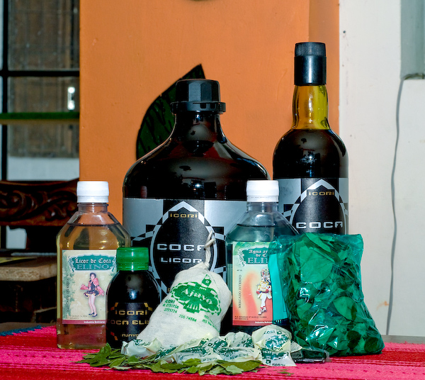 coca coca museum koka bolivia evo morales